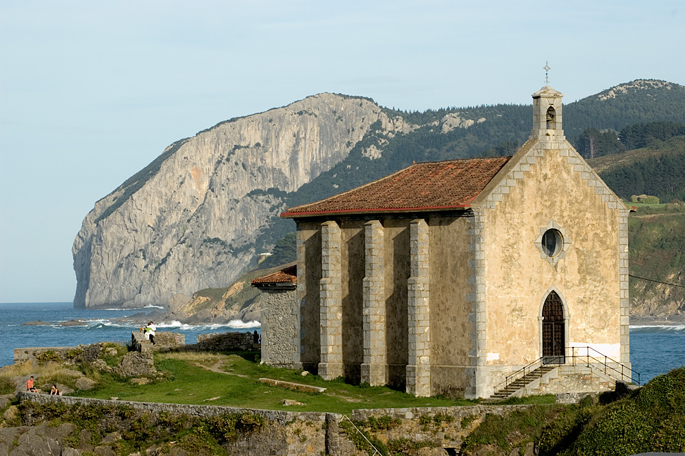 Lekua ikusi nuenean flipatu nuen, Irlandako kostaldea ematen du.